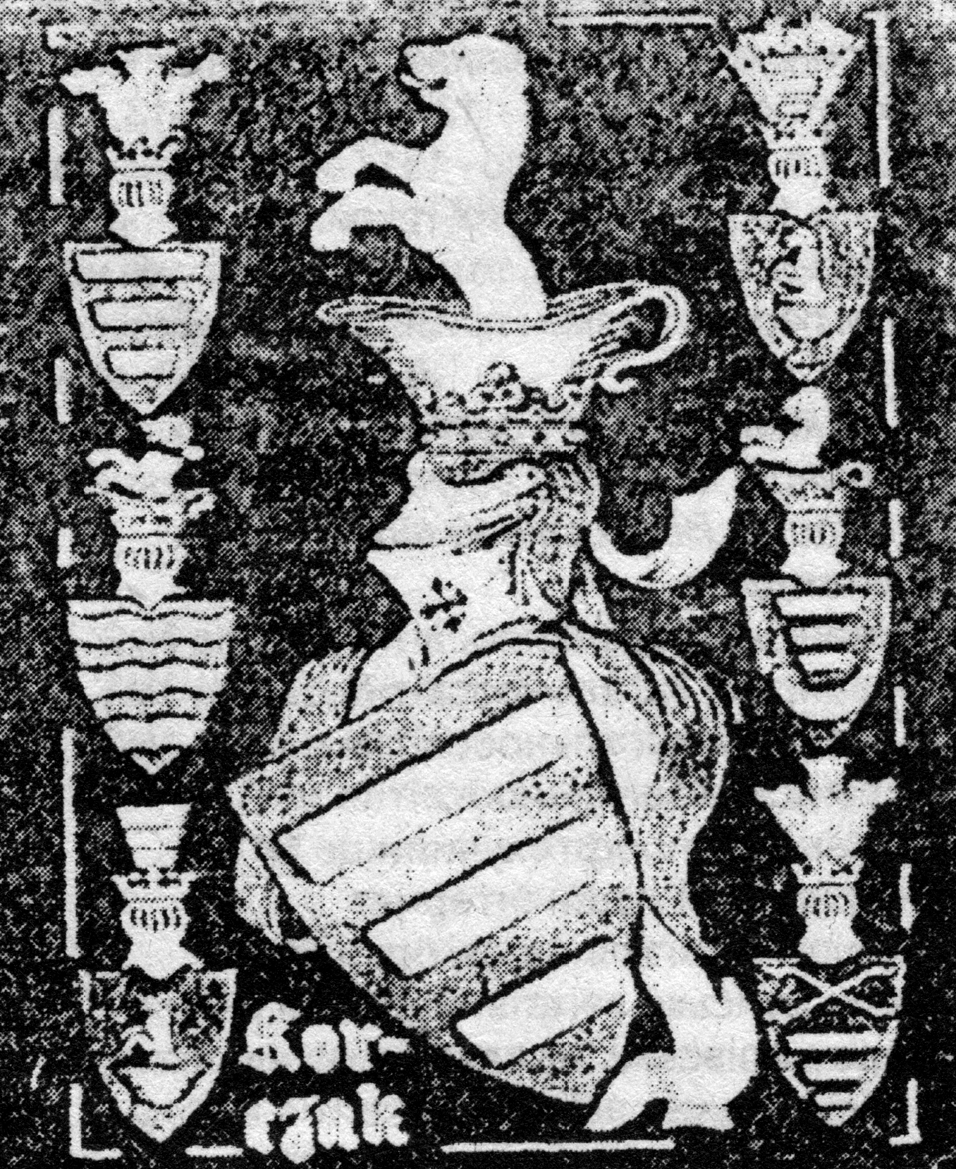 з книги "Історія Тиврівщини"